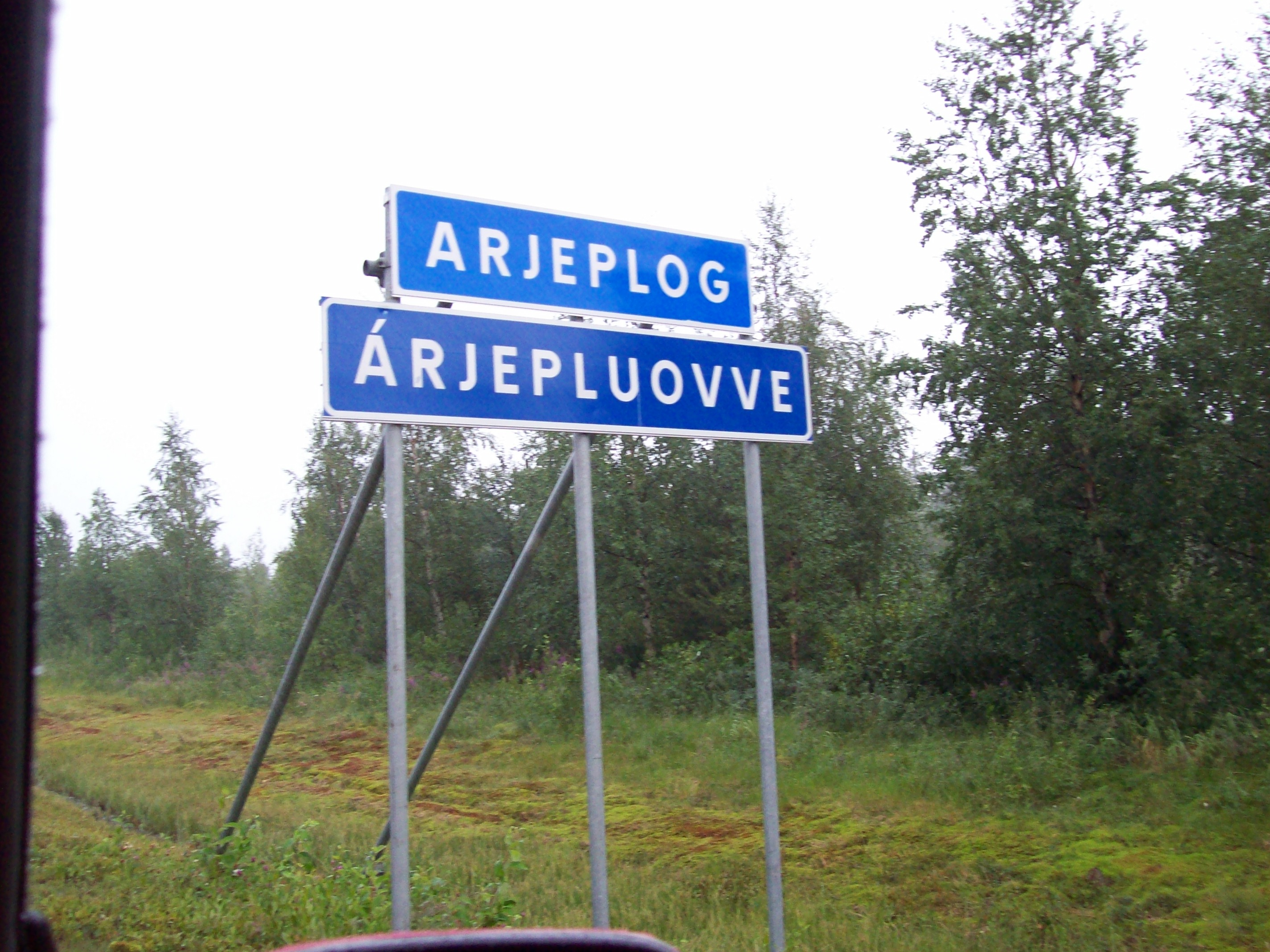 Pitesamisk Árjepluovve svarar til svensk Arjeplog.